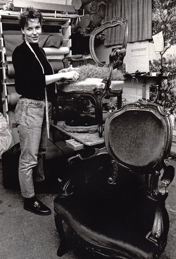 Möbeltapetserare Sonja Carlsson lägger ut stoppning på en stol. Malmö 1988.